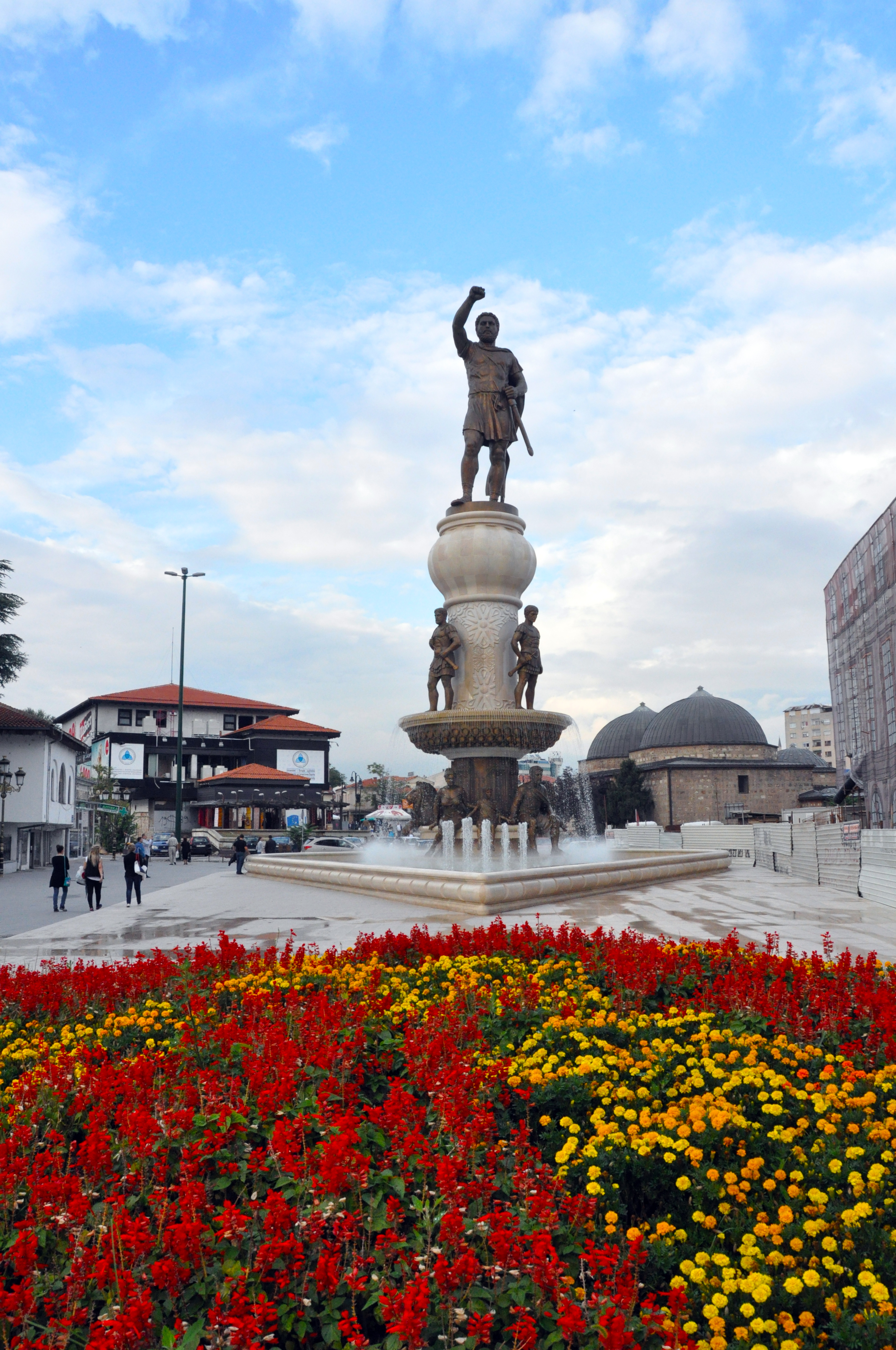 Споменик на Филип Втори Македонски - Скопје